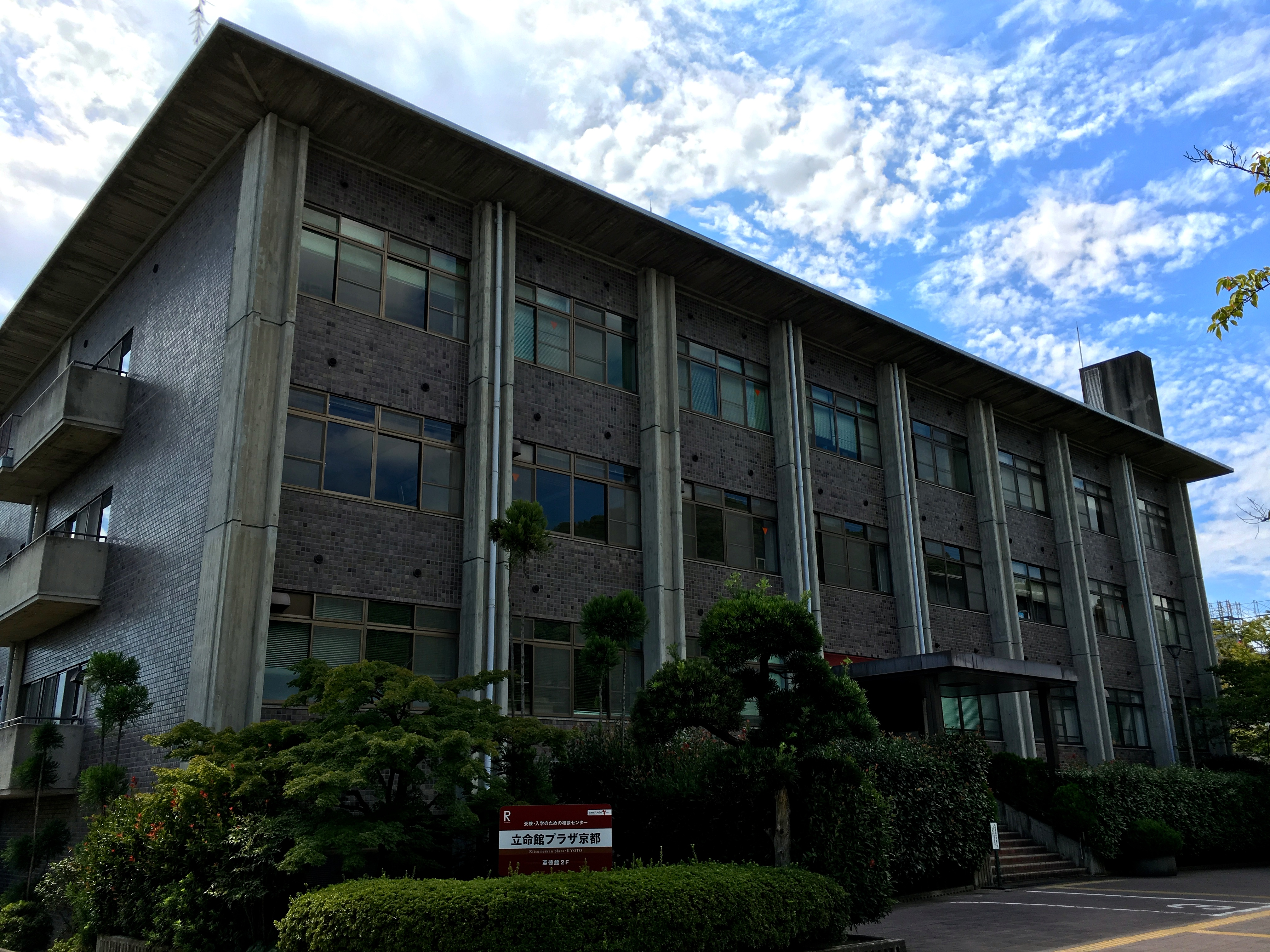 The photo was taken by me on September 10, 2016.